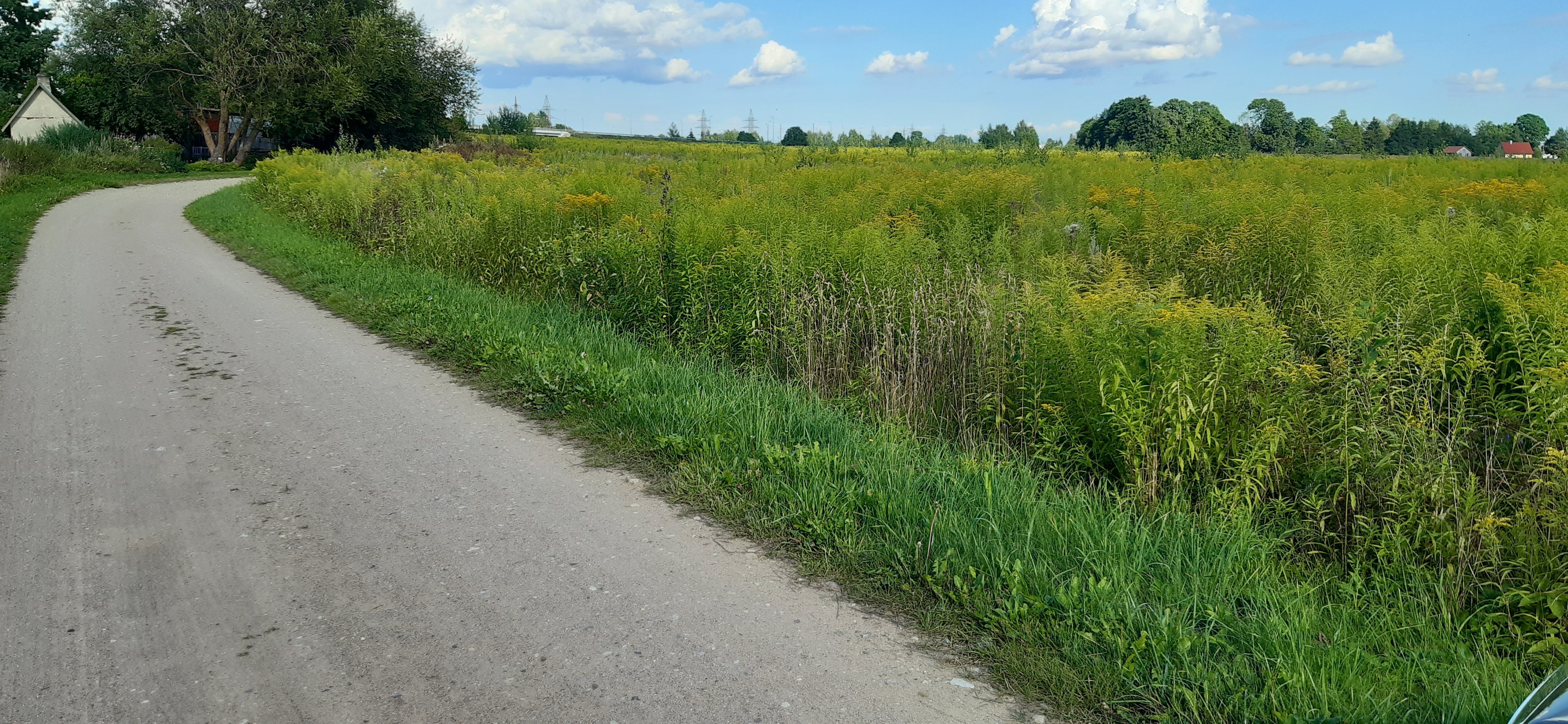 Pildil on näha, kuidas Kanada kuldvits võtab Eestis hooldamata maadel võimust.